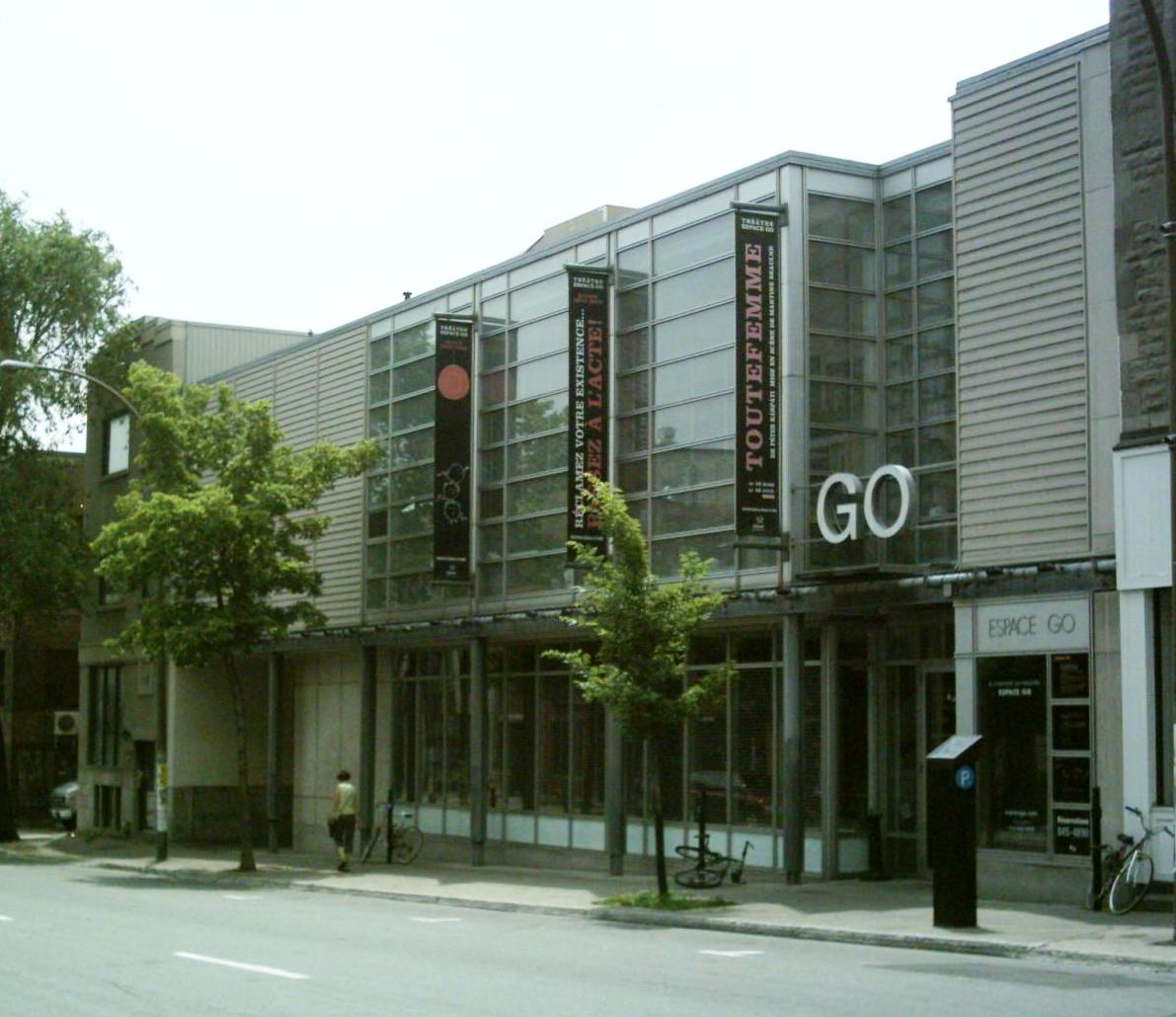 Espace Go est une salle de spectacle de Montréal située au 4890 boulevard Saint-Laurent.